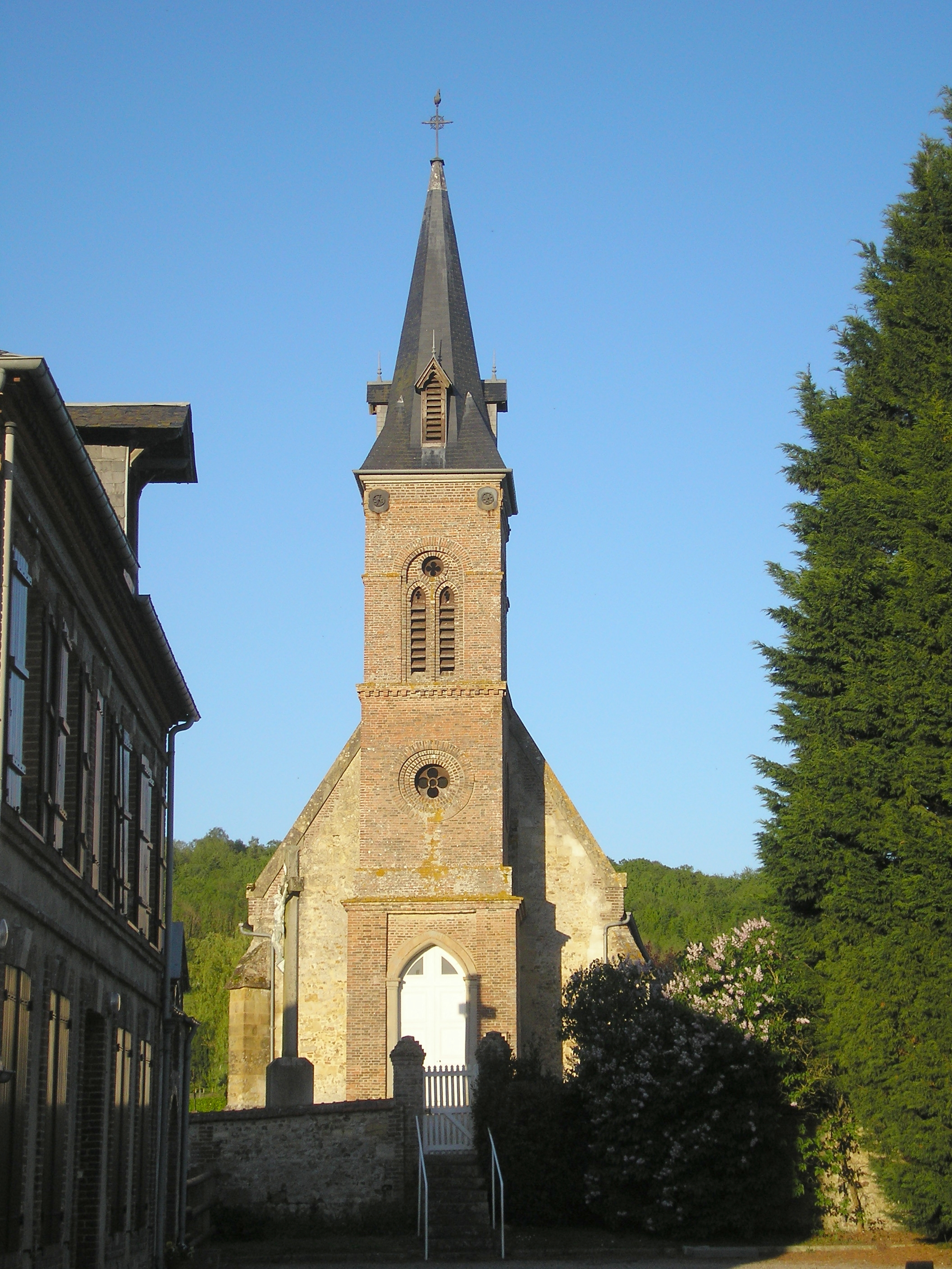 Canapville (Normandie, France). L'église Saint-Aubin.